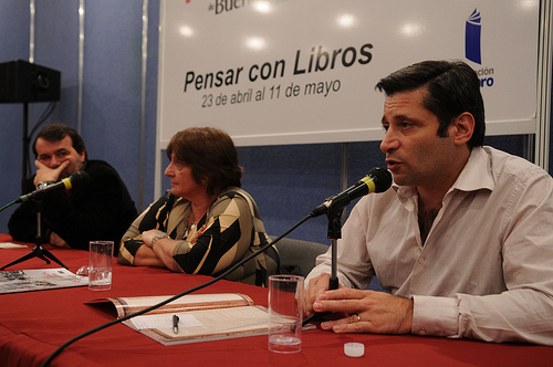 Víctor Santa María en la presentación de su libro escrito junto con María Seoane, "El Cordobazo, los 20 días que conmovieron a la Argentina", en la Feria del Libro de Buenos Aires del 2009.